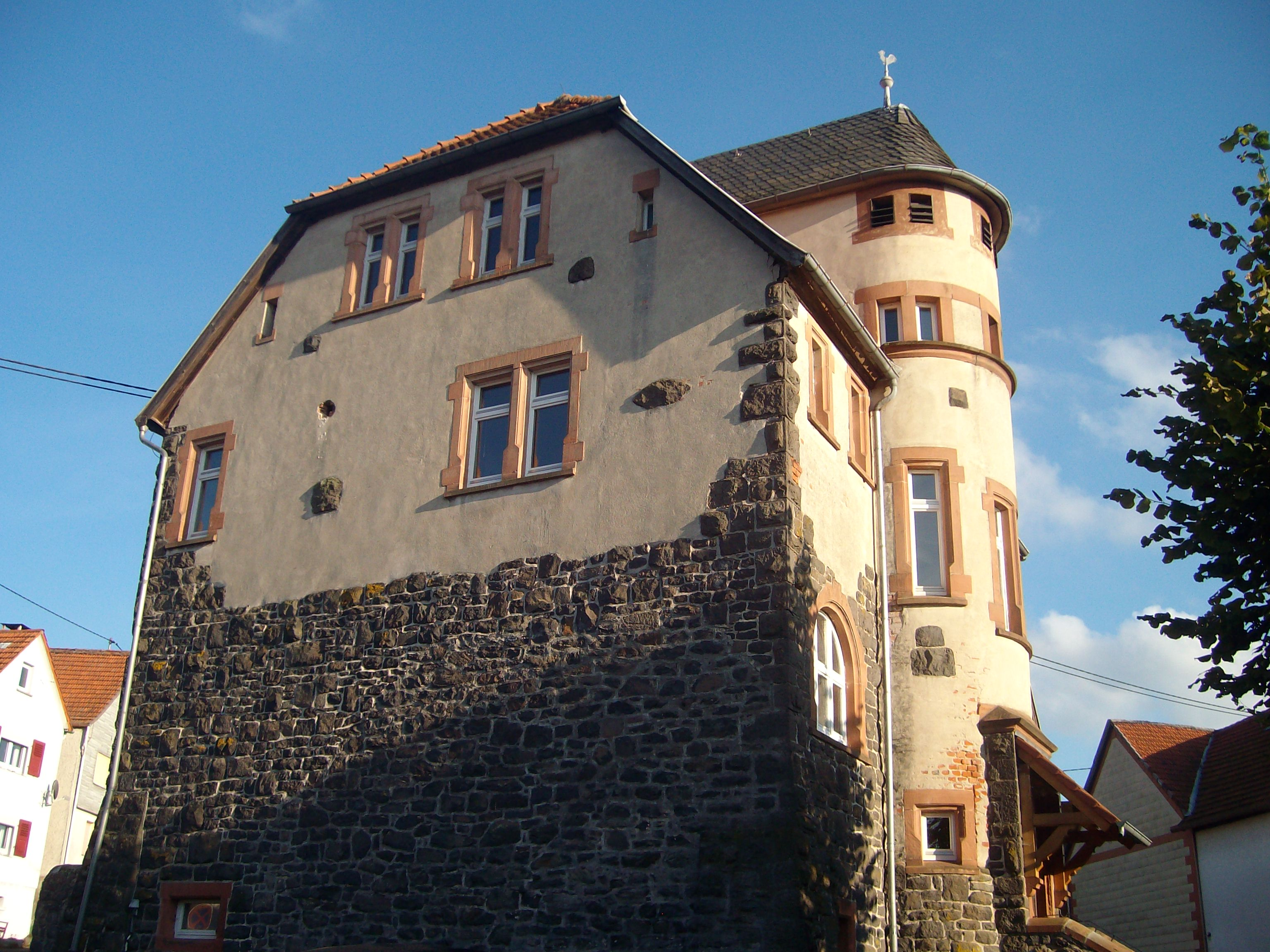 Westseite der Evangelischen Kirche Altenhain, Laubach, Landkreis Gießen, Hessen, Deutschland